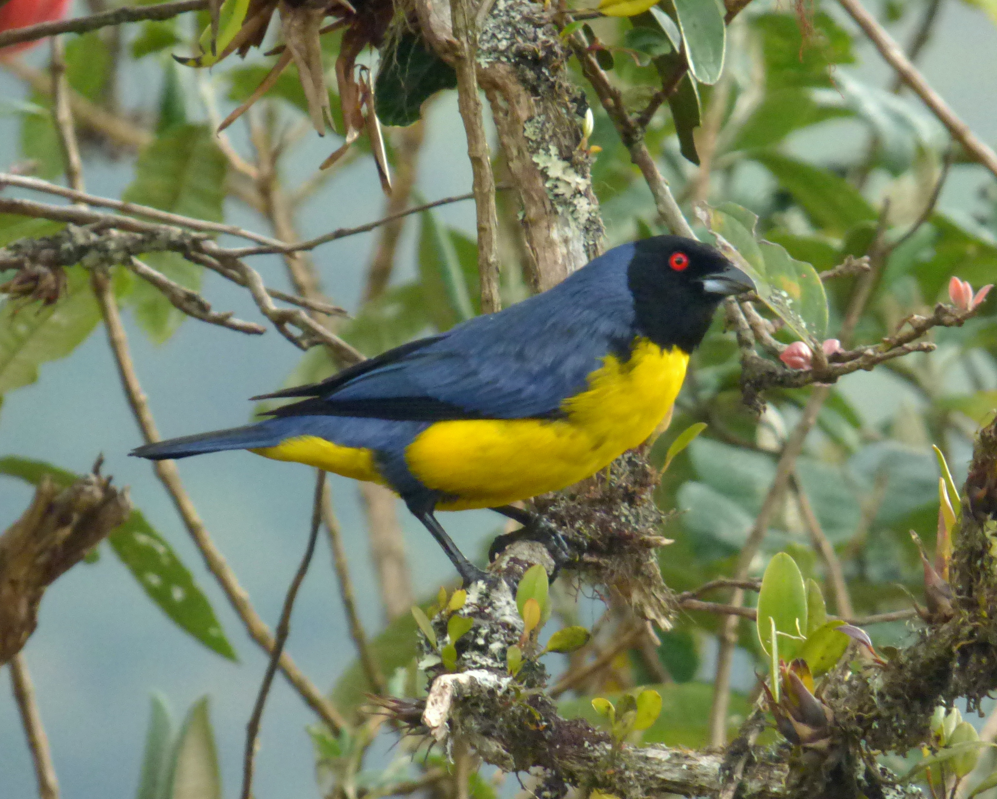 Buthraupis montana (Azulejo real) (4)